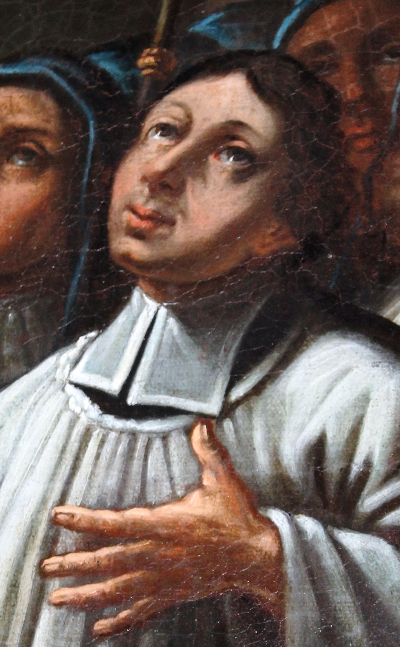 Faistenauer Vikar